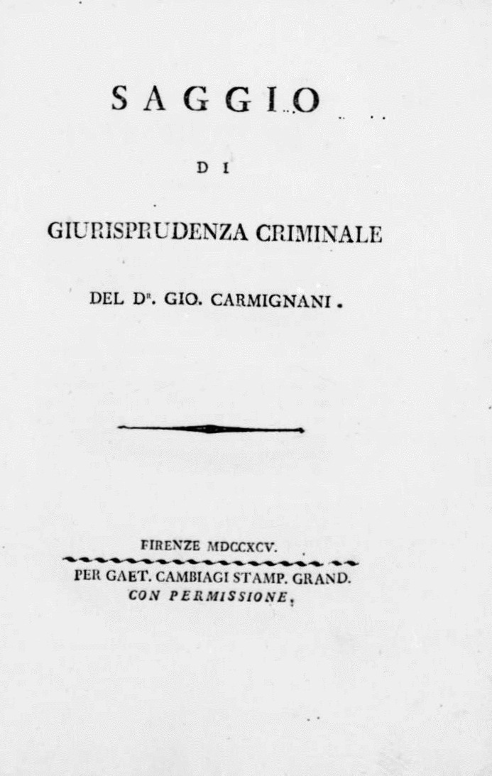 Frontespizio